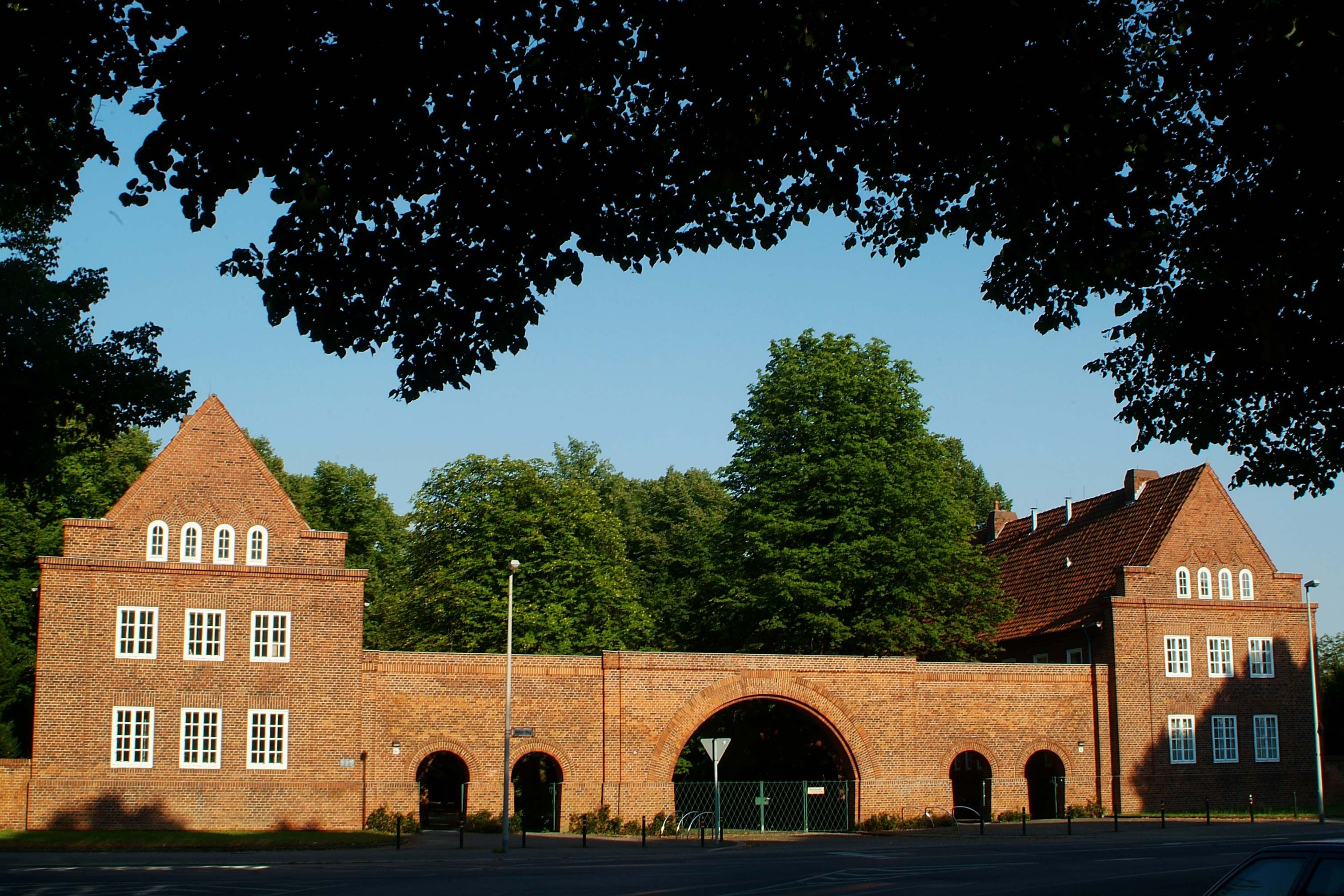 Einfahrtshäuser mit Durchgängen und Feuerwehrzufahrt für den Stadtfriedhof Seelhorst, Eingang Hoher Weg 15 und 15 A ...